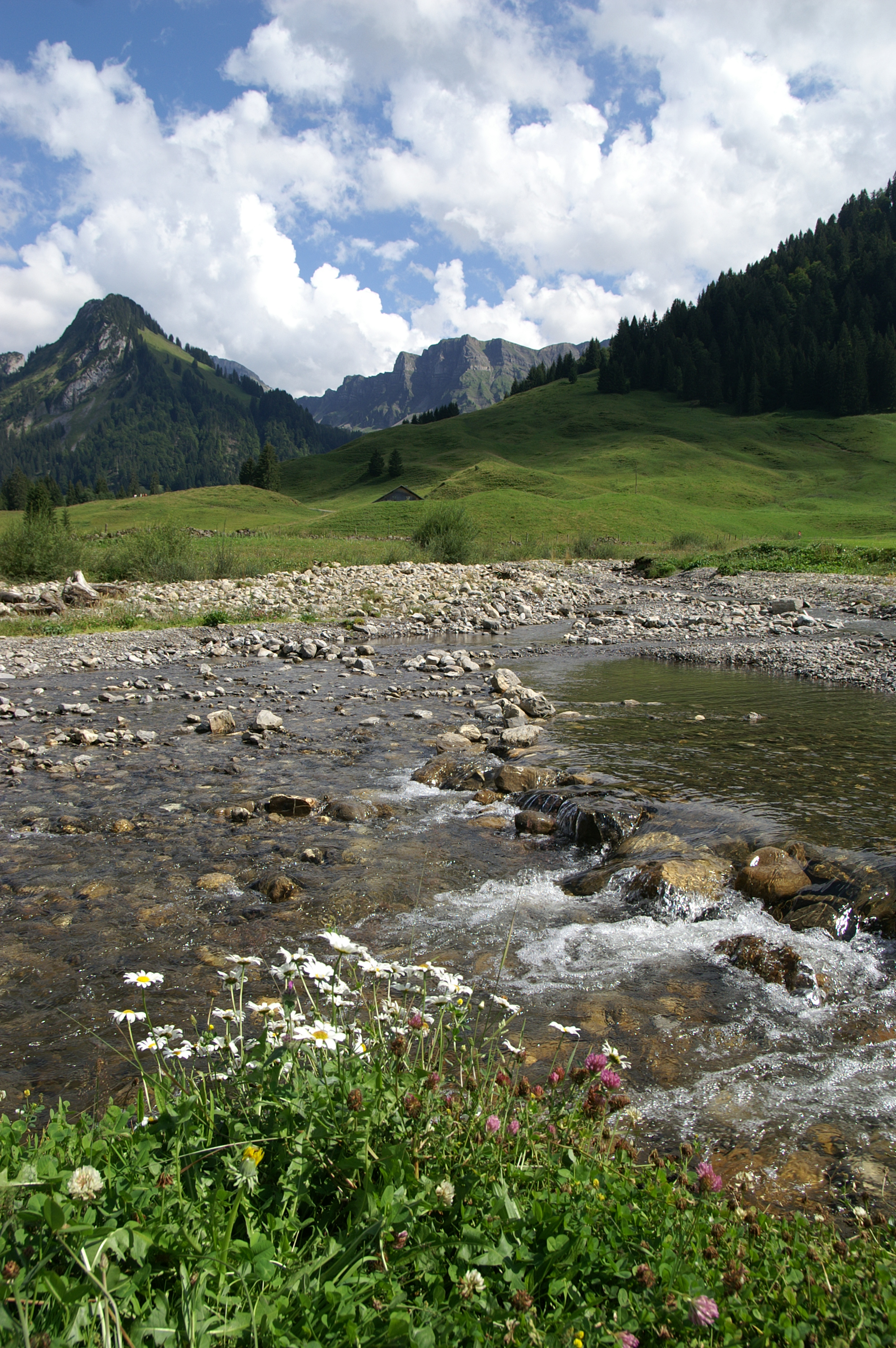 Vorsäss, Maisäss Schönenbach bei Bizau im Bregenzerwald im Vordergrund die Subersach der Sevisschrofen 1659m, im Hintergrund Hehle Kopf 2058m und Pellinger Köpfle 1994m